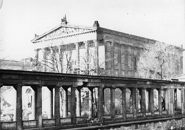 Berlin, Nationalgalerie Zentralbild Kümpfel Ho. 24.7.51 Die Nationalgalerie in Berlin